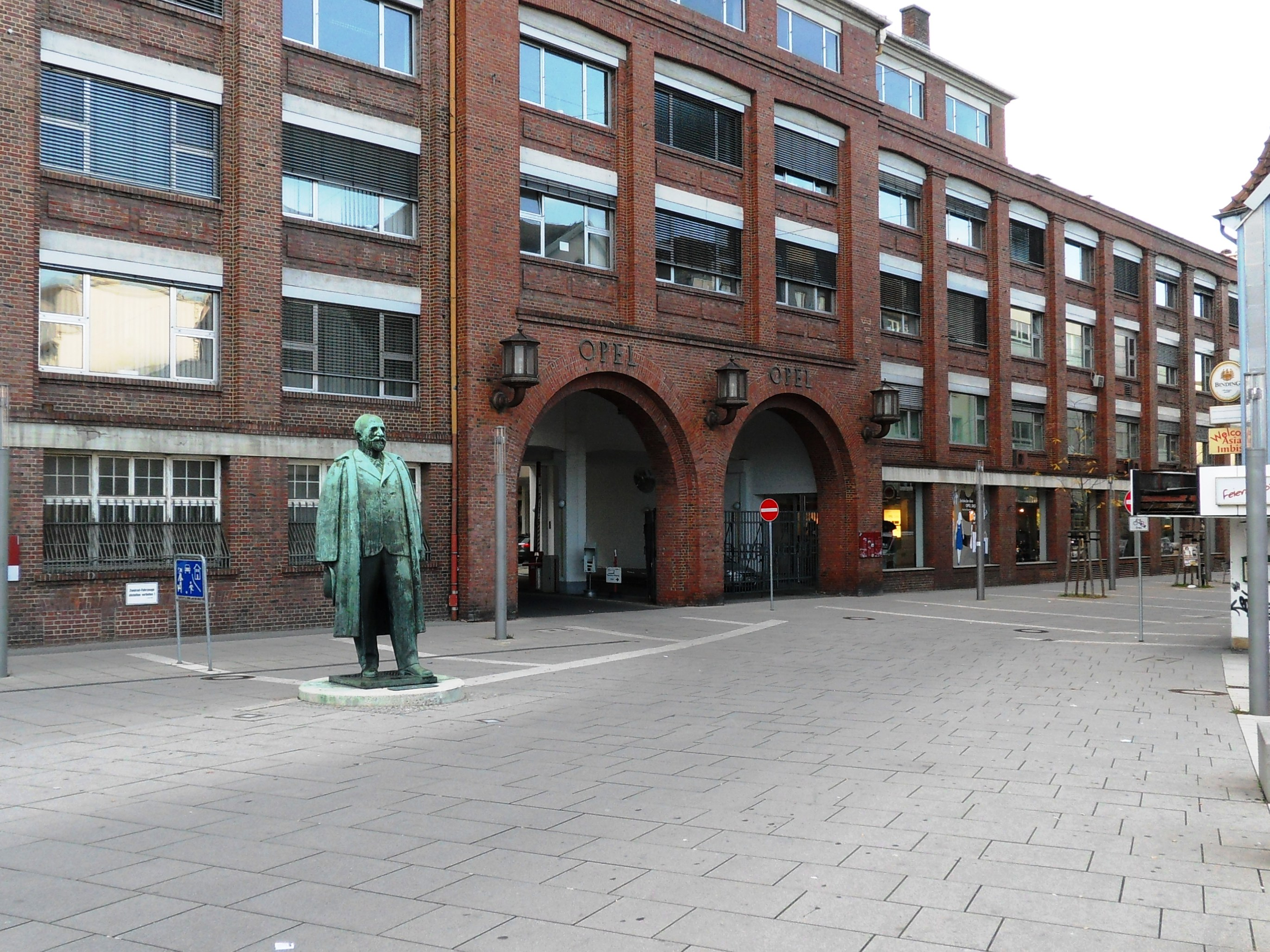 Opel-Hauptportal und Portalgebäude in der Marktstraße von Rüsselsheim am Main in der Nähe des Bahnhofs; vor dem Portal eine überlebensgroße Statue des Firmengründers Adam Opel